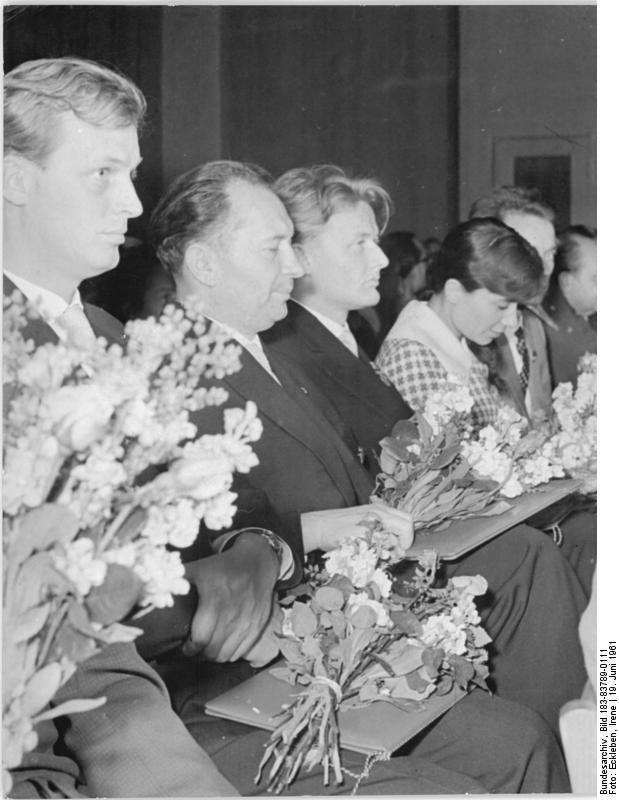 Magdeburg, 3. Arbeiterfestspiele, Preisverleihung Zentralbild Eckleben 19.6.1961 3. Arbeiterfestspiele des FDGB. Literatur- und Kunstpreis des FDGB 1961 verliehen. Der Literatur- und Kunstpreis des FDGB 1961 wurde anlässlich der 3. Arbeiterfestspiele am 16.6.1961 in der Magdeburger Parkgaststätte "Herrenkrug" verliehen. Die Auszeichnung nahm der Vorsitzende des FDGB-Bundesvorstandes, Herbert Warnke, vor. UBz: Die Literaturpreisträger Herbert Nachbar, Karl-Heinz Schleinitz, Walter Baumert und Brigitte Reimann (vlnr)